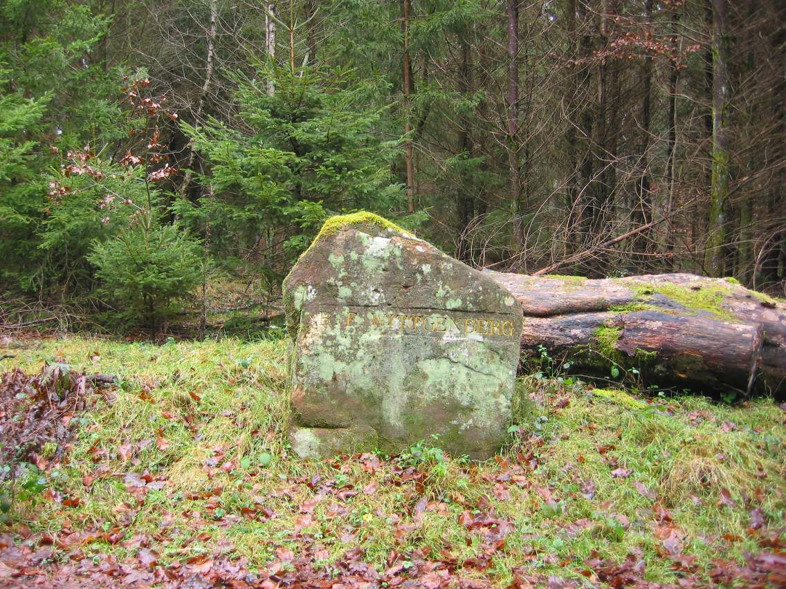 Ritterstein Nummer 116, R. F. Wittgenberg